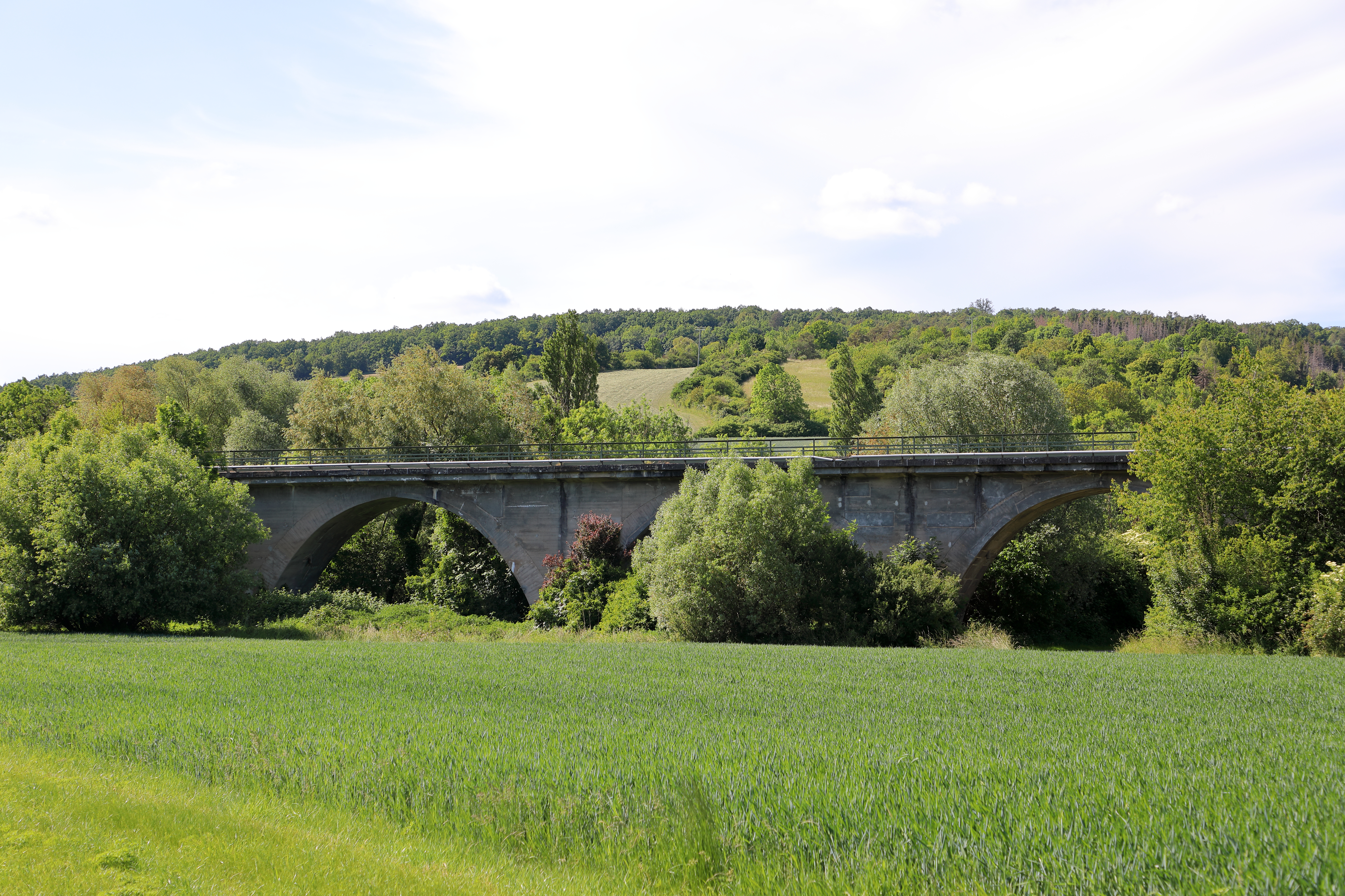 Die Eisenbahnbrücke Weikersheim überquert den Fluss Tauber und den Taubertalradweg bei Weikersheim.